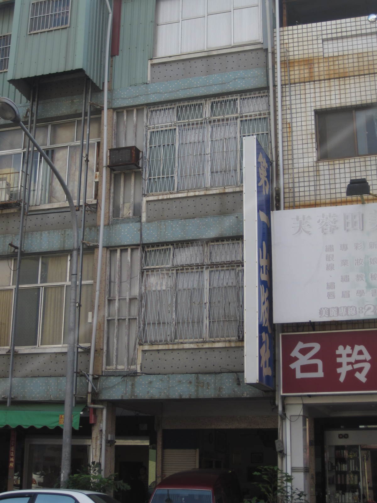 高雄市歷史建築，柯旗化故居 (第一出版社) 之外觀。